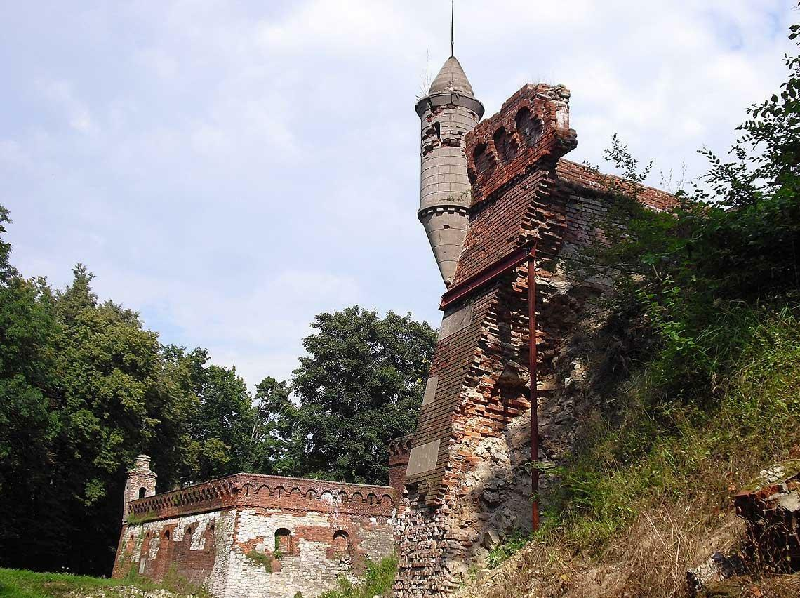 Ceglany bastion i metalowe podpory.